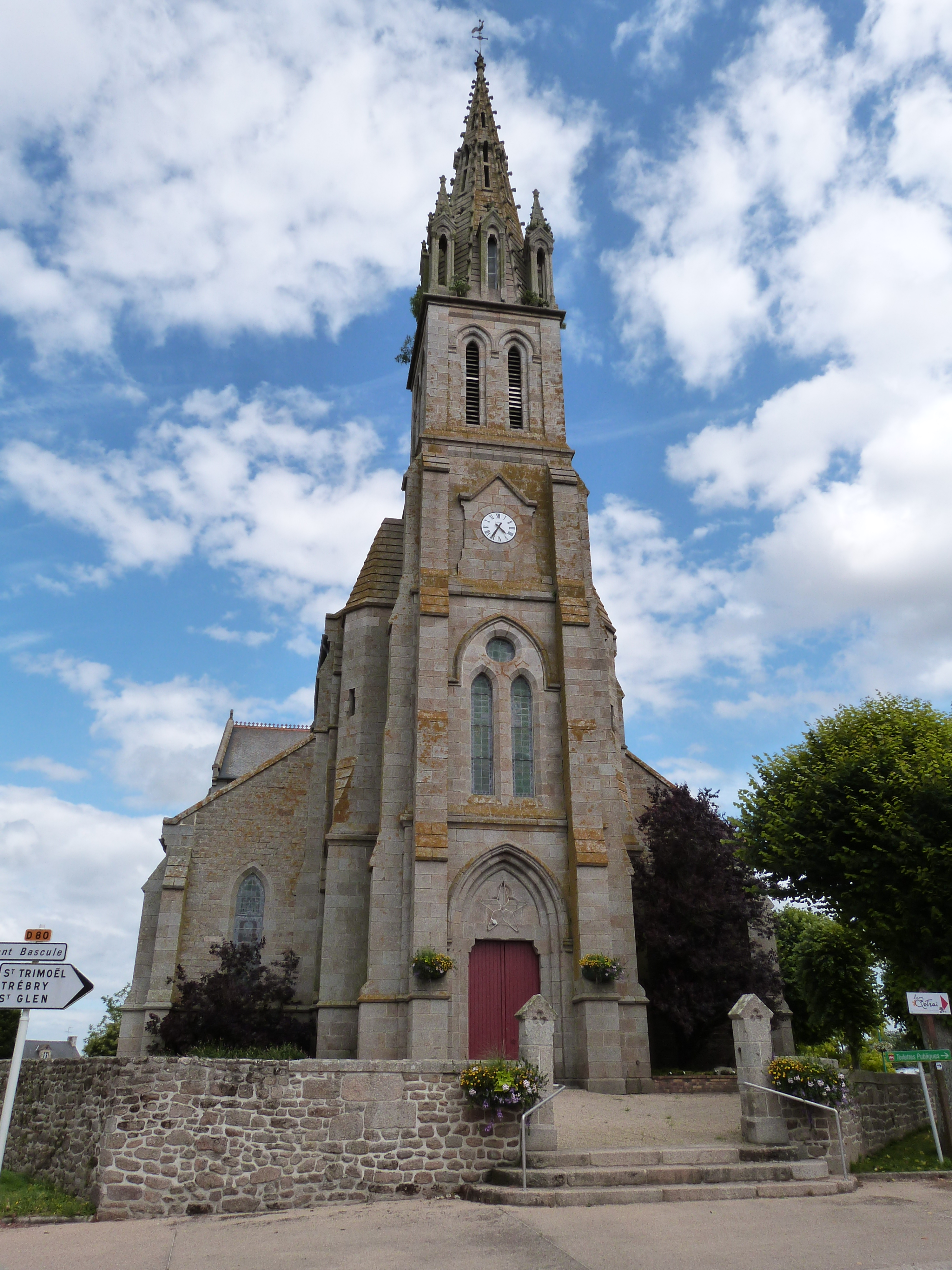 Eglise Notre-Dame à Bréhand